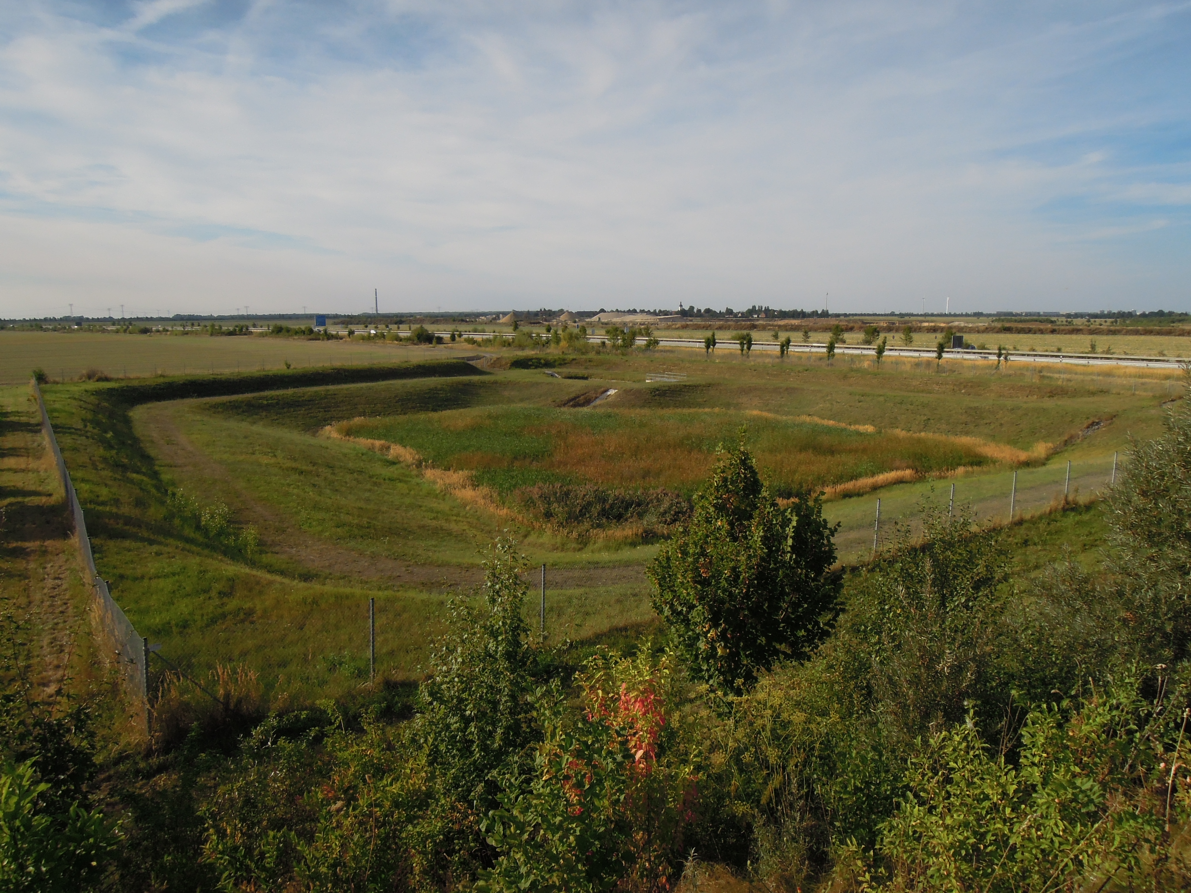 Abwasserauffangbecken der A 38, fotografiert von der Brücke der Verbindungsstraße zwischen Knautnaundorf und Knauthain.